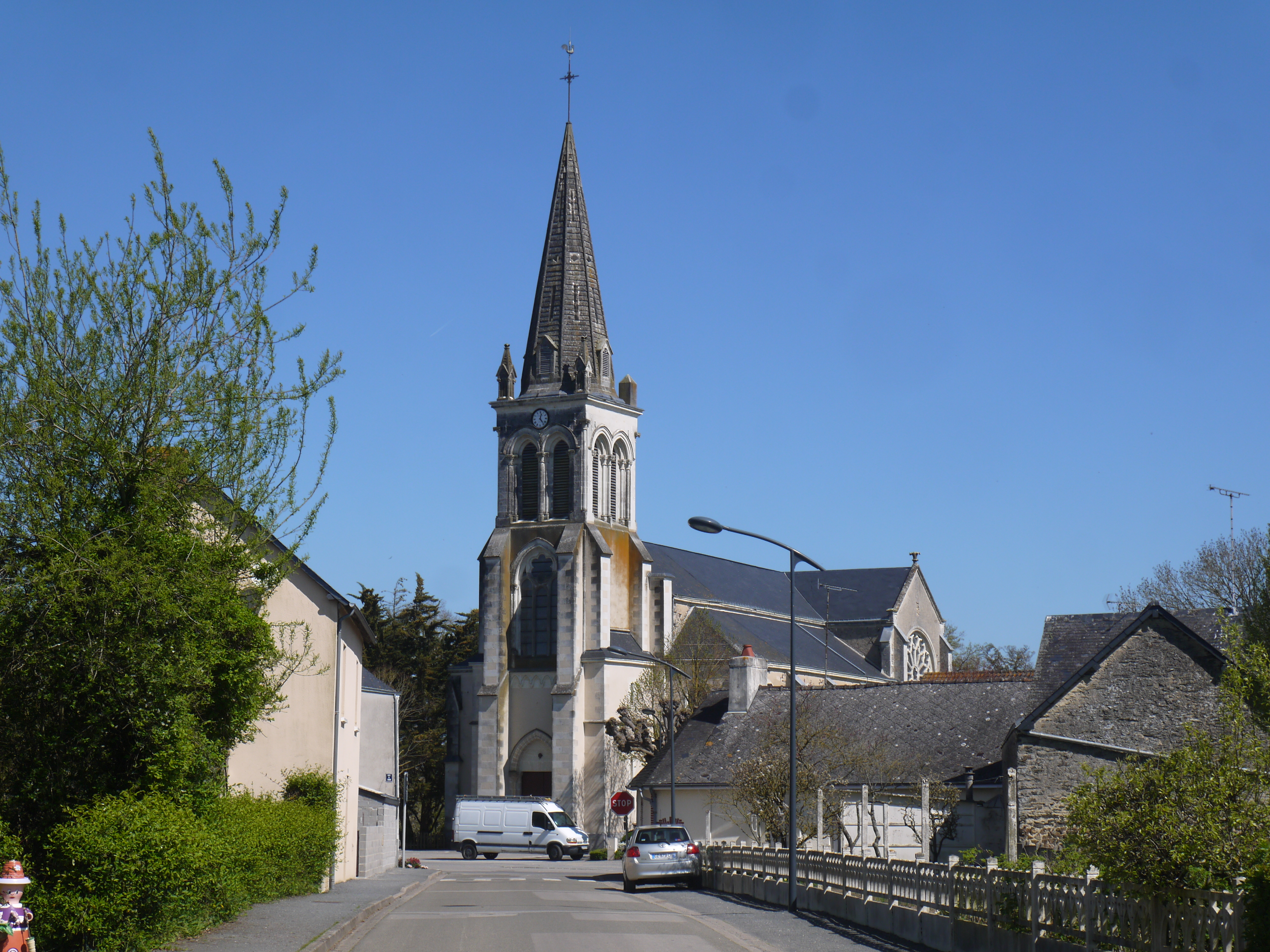 L'église d'Athée.